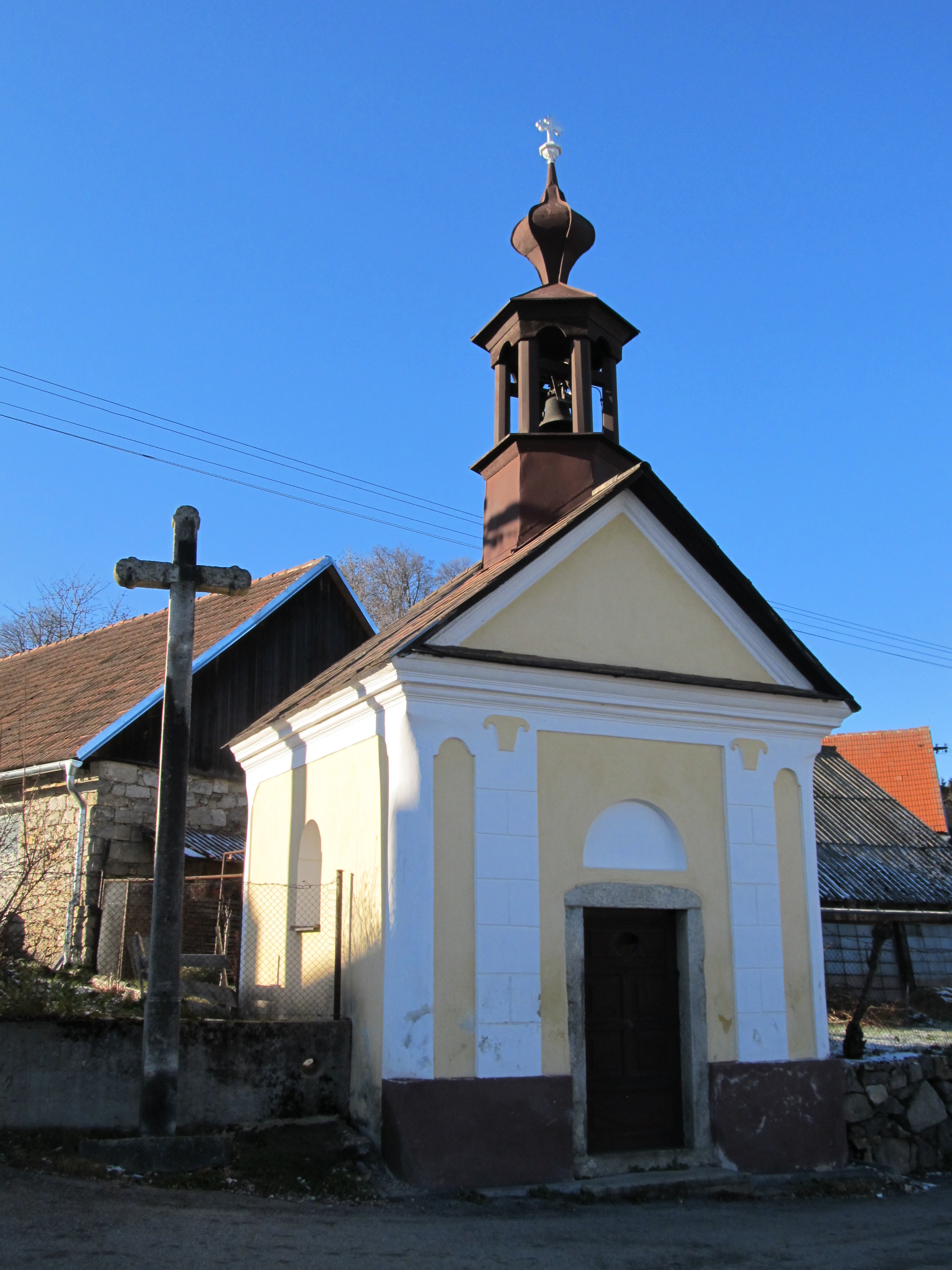 Radhostice - kaple sv. Jana Nepomuckého